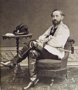 Viktor Boos-Waldeck (1840 - 1916), Rakouský šlechtic a politik.